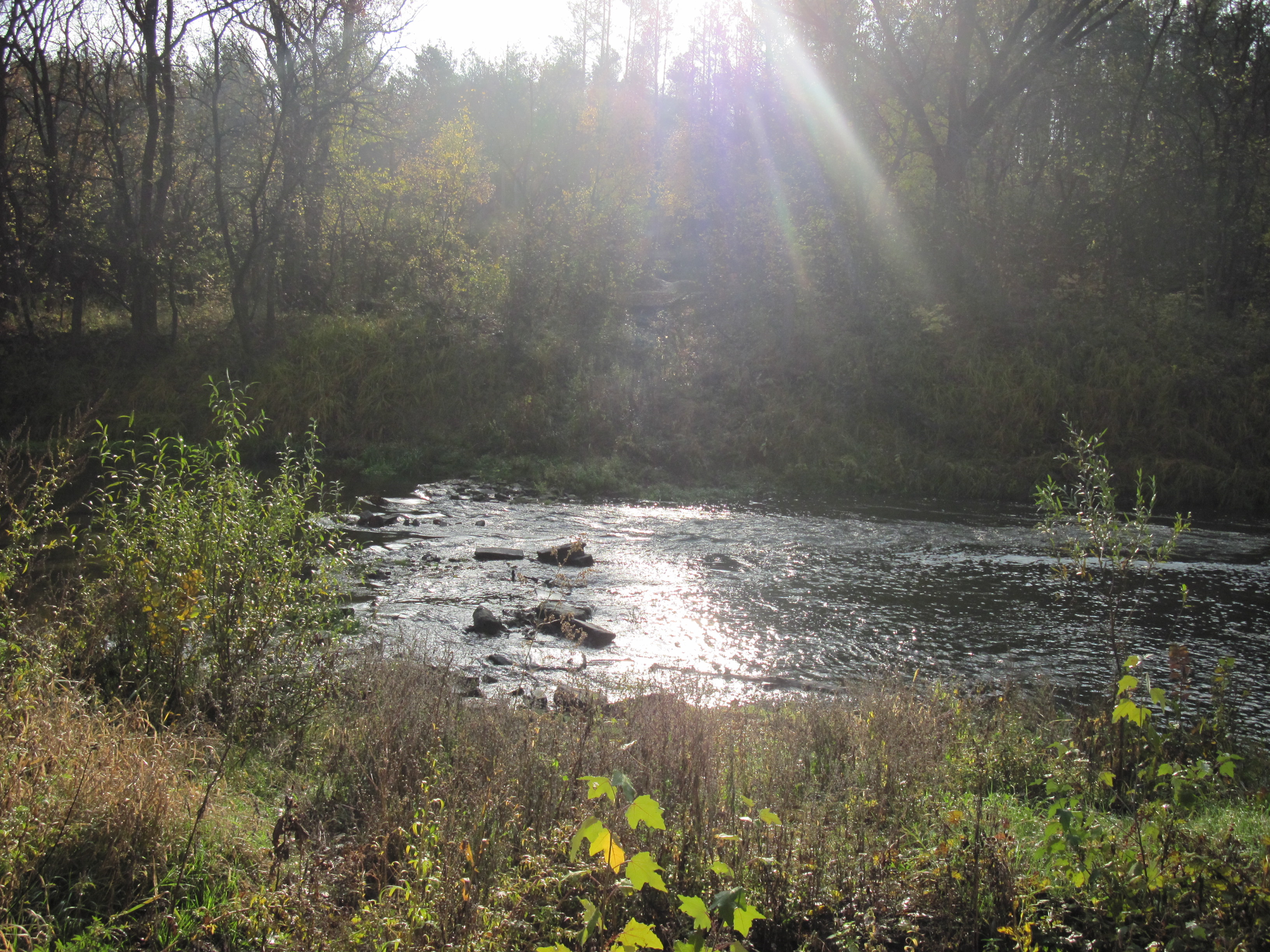 Краєвид в заказнику Деркульський (Луганщина). Фото з правого берега Деркулу в районі біостанції Ново-Ільєнко